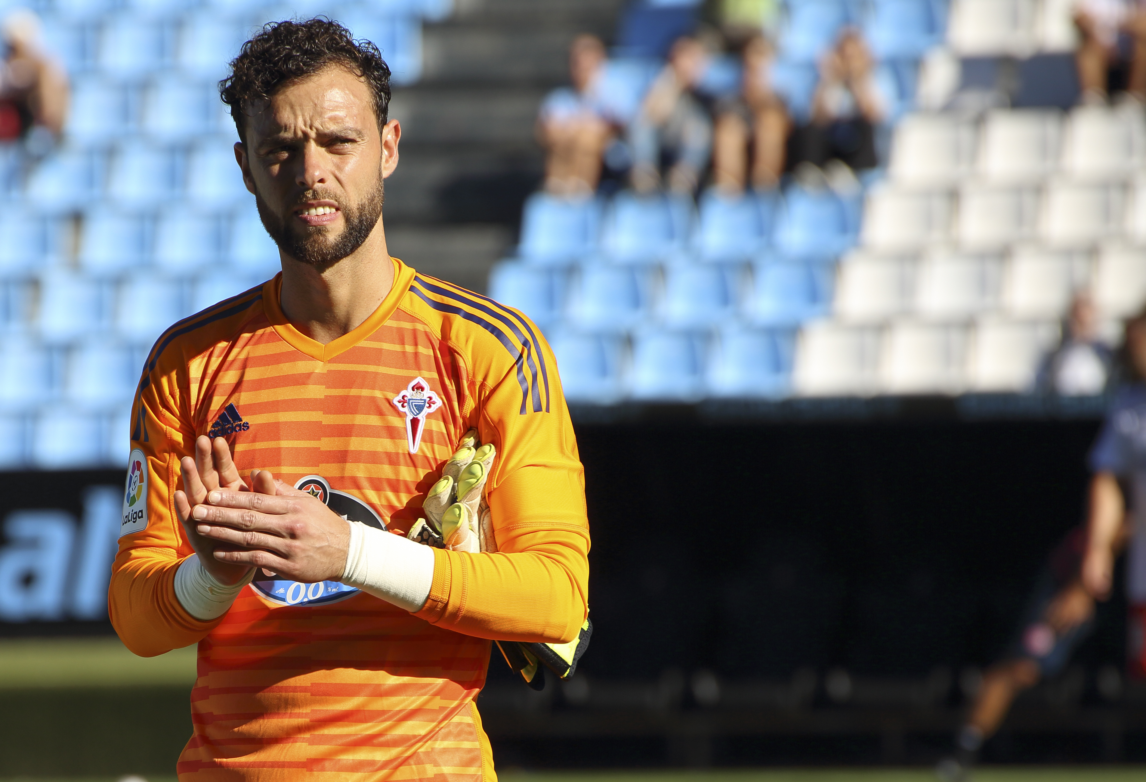 Presentación RC Celta - Temporada 18/19